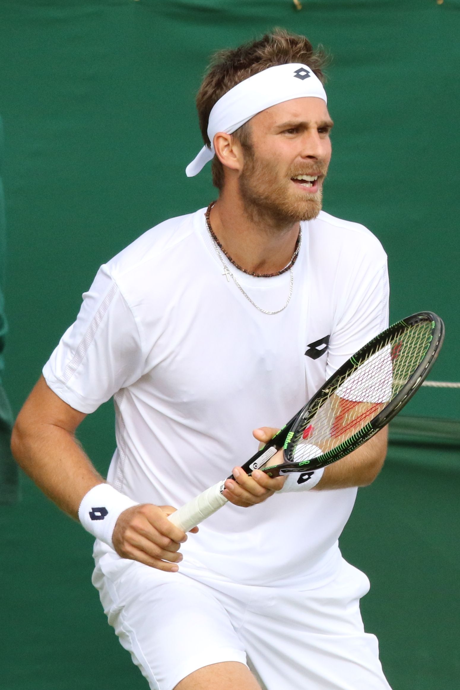 Gombos WMQ16 (20)